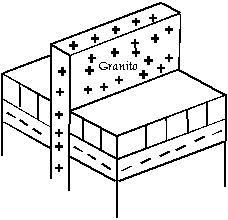 Esquema de un dique granítico